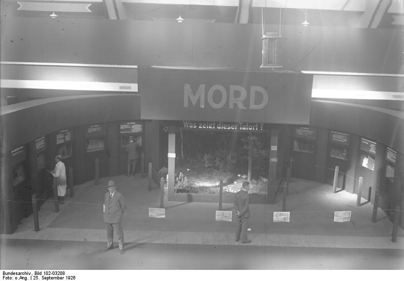 Eröffnung der grossen internationalen Polizeiausstellung in Berlin! wurde am 25. September 1926 durch den preussischen Innenminister Severing eröffnet. Die Ausstellung ist die grösste dieser Art in der Welt. Aus der Abteilung "Kriminalstik". Die Demonstrierung eines Tatortes von einem Mord bis zur Ergreifung des Täters.